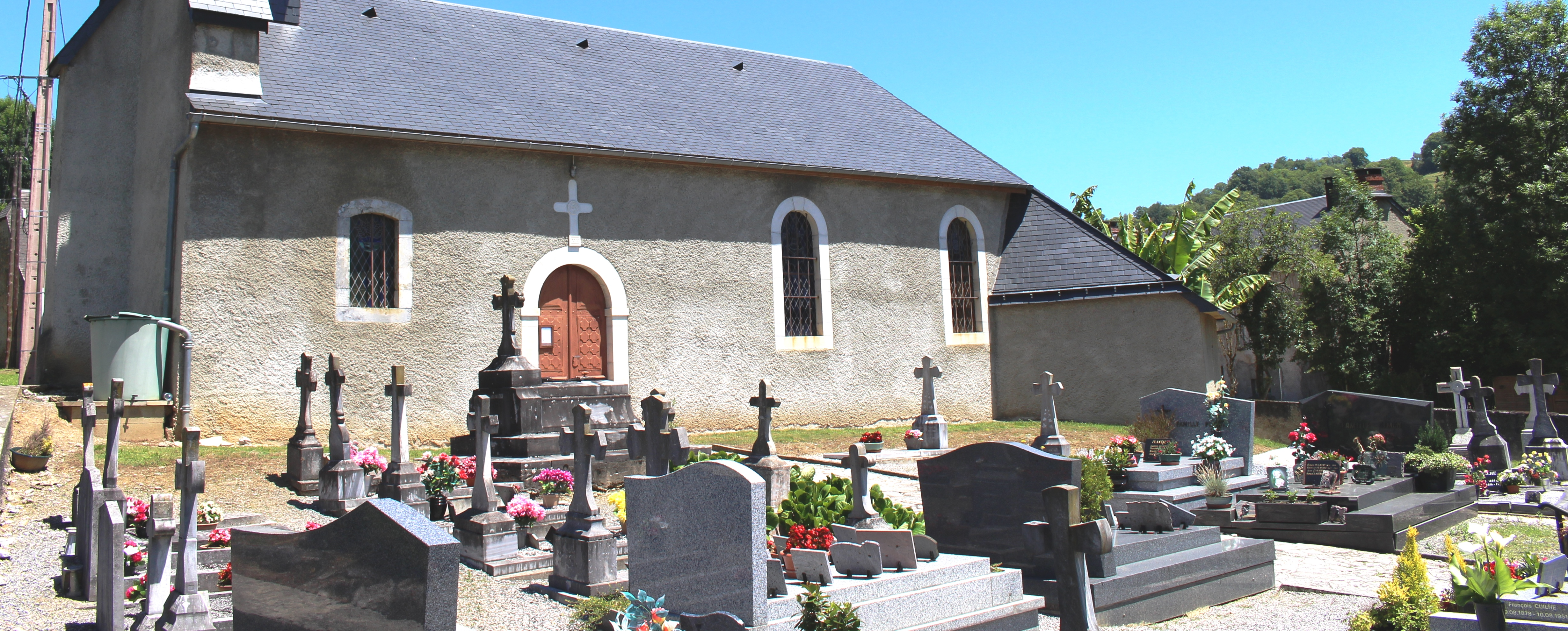 Cimetière de Batsère (Hautes-Pyrénées)